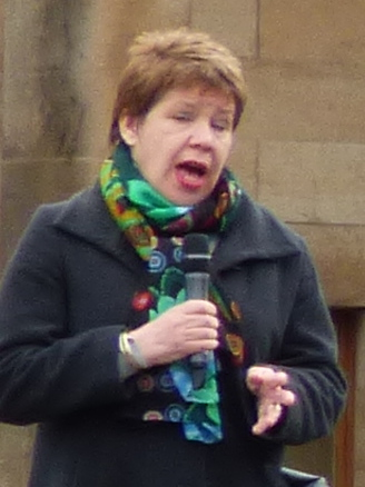 Lesley Hinds